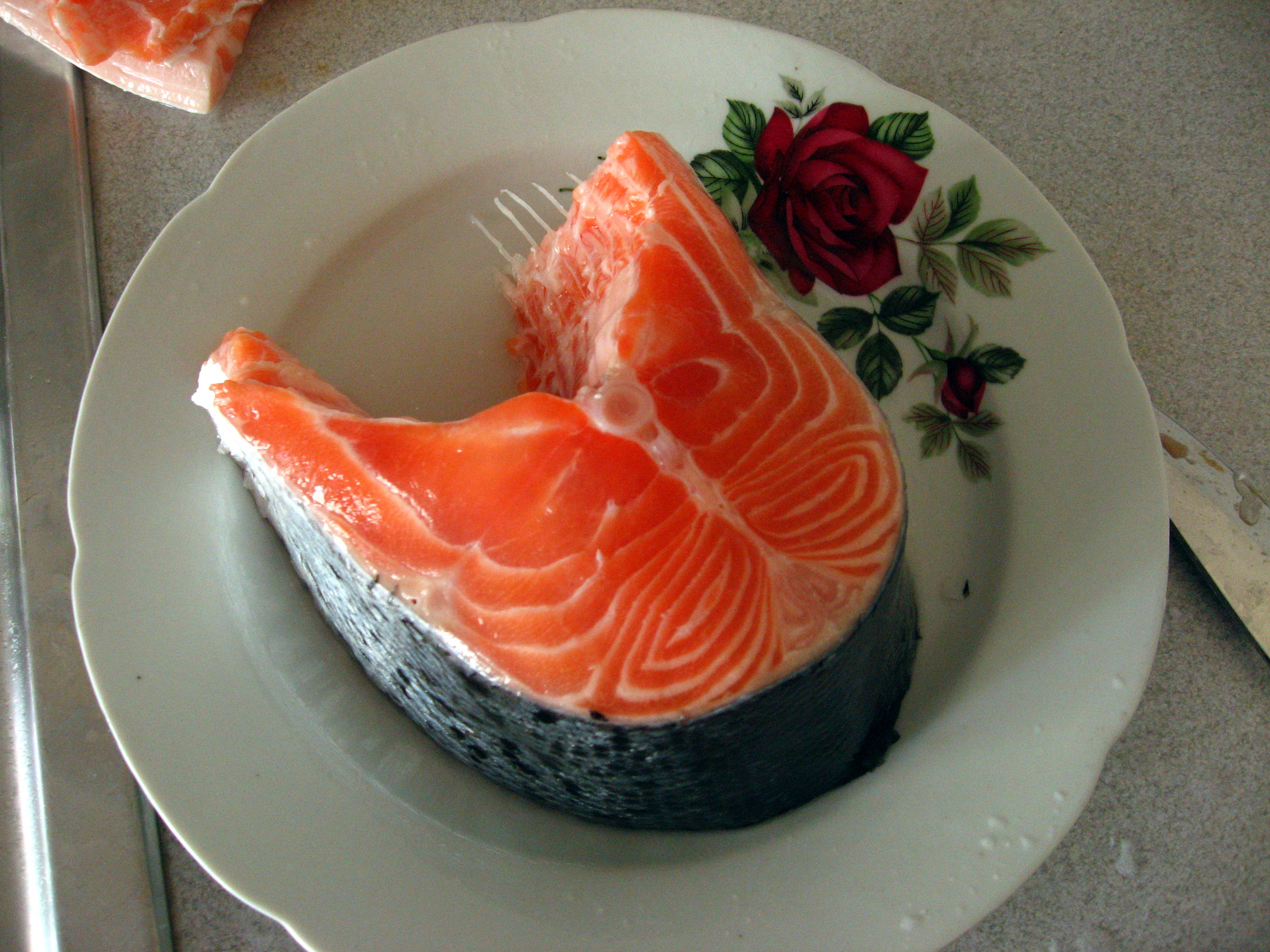 kus lososa